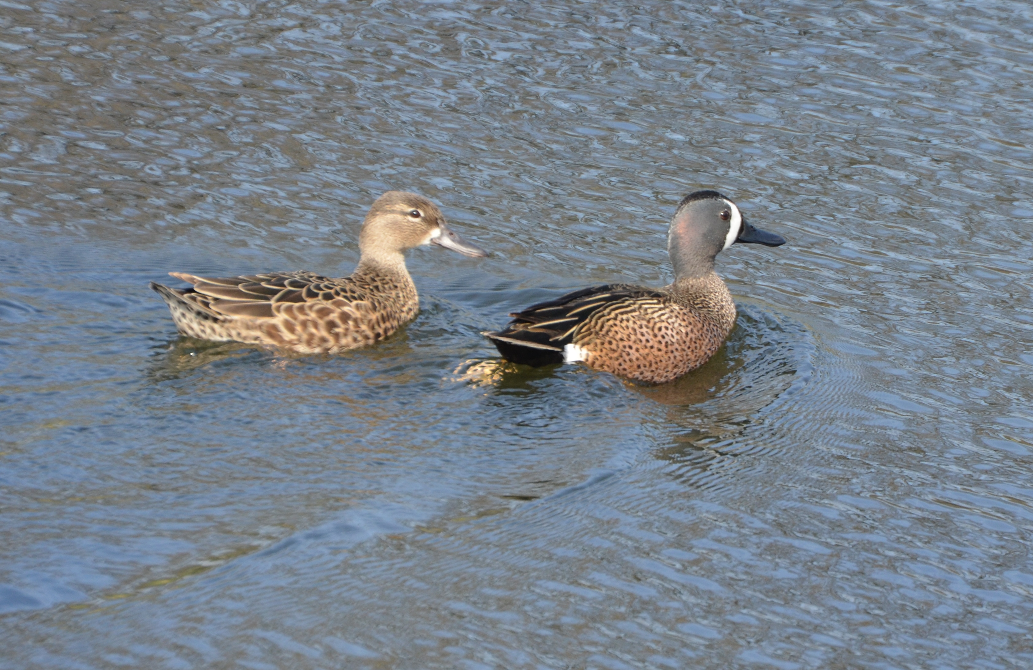 Carondelet Park 4/12/14